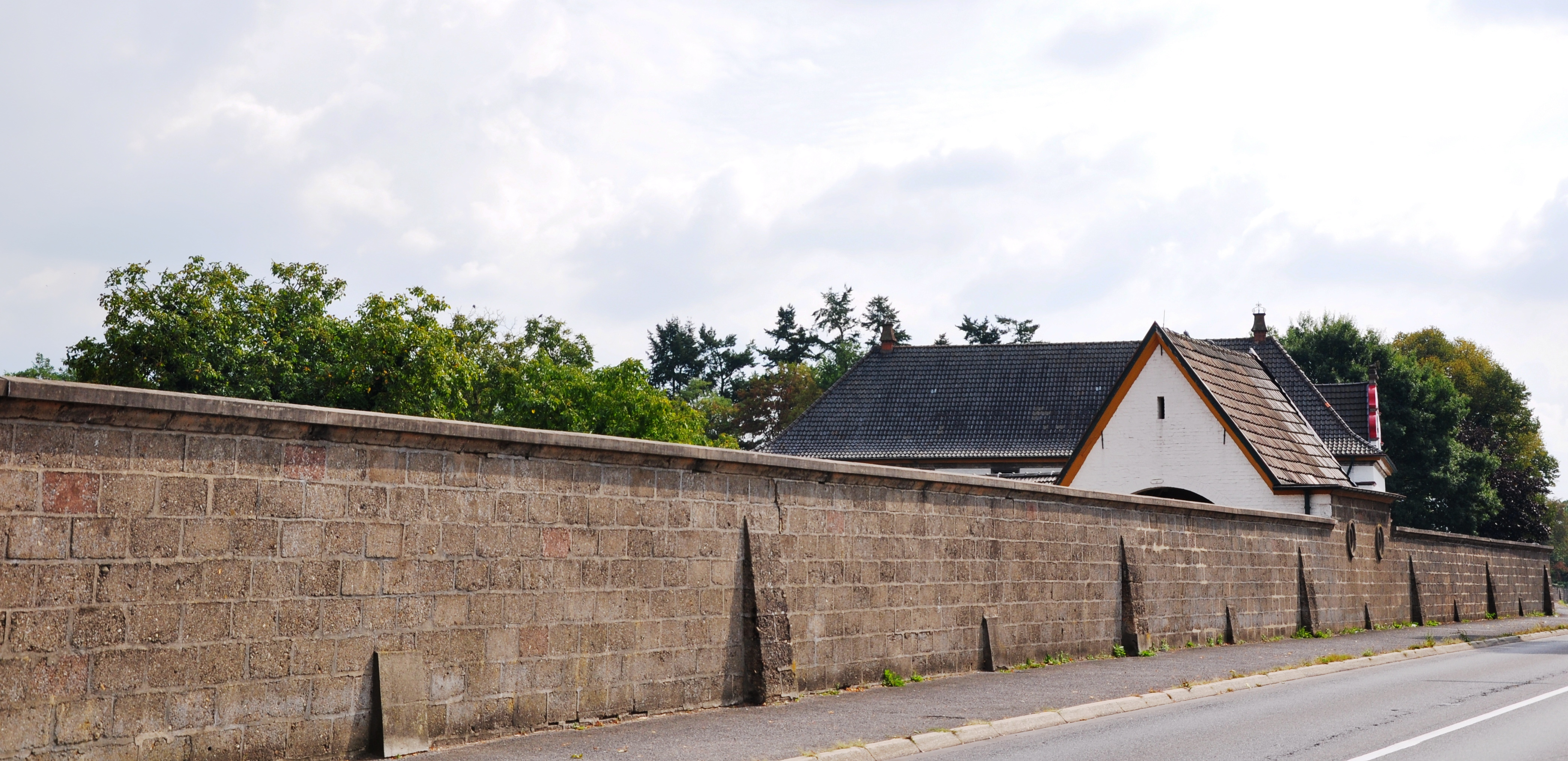 Mauer von Schloß Röttgen, Eiler Straße, Blick nach Süden